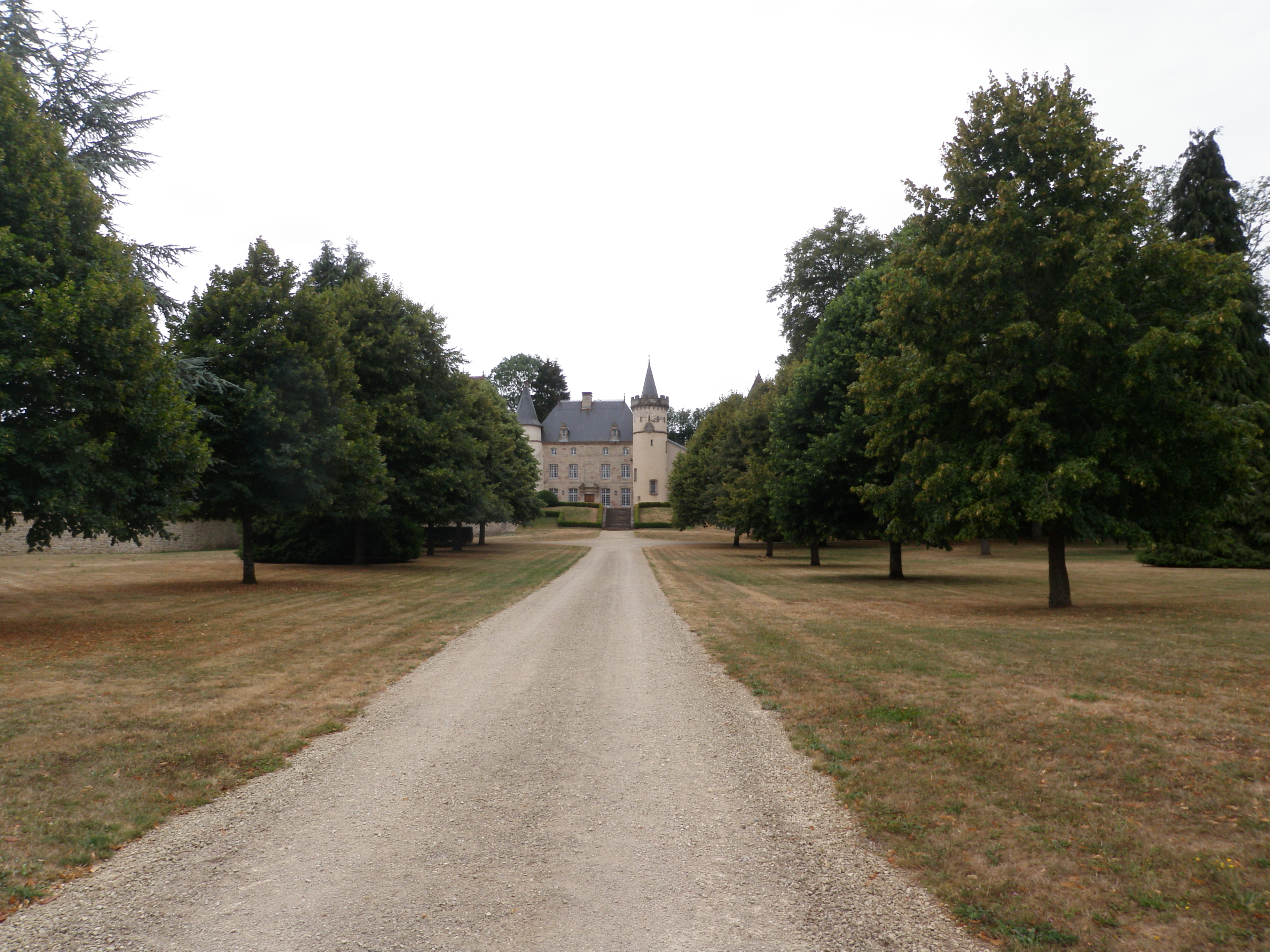 Château de Lichecourt (commune de Relanges)